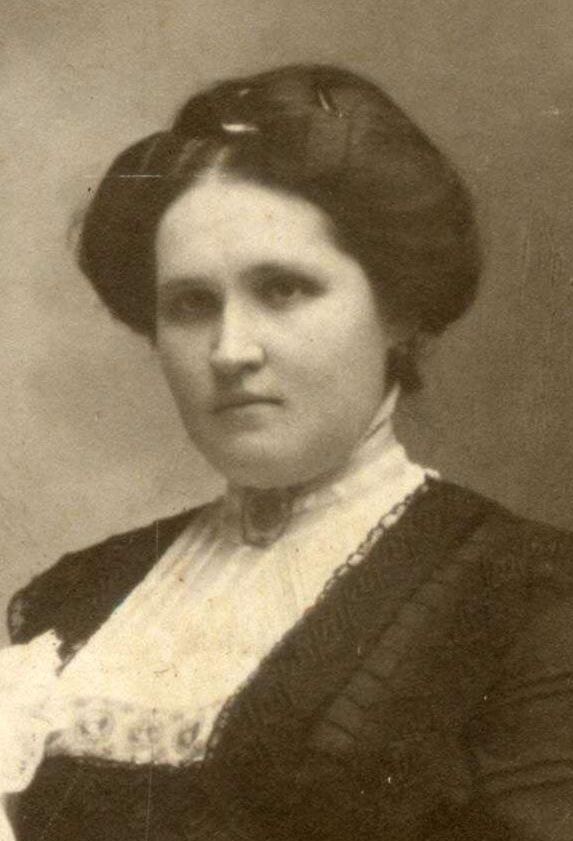 Boldogfai Farkas Zsófia (1884-1948), Fangler Béla (1877-1952) nemzetgyűlési képviselő felesége, Zalaegerszeg